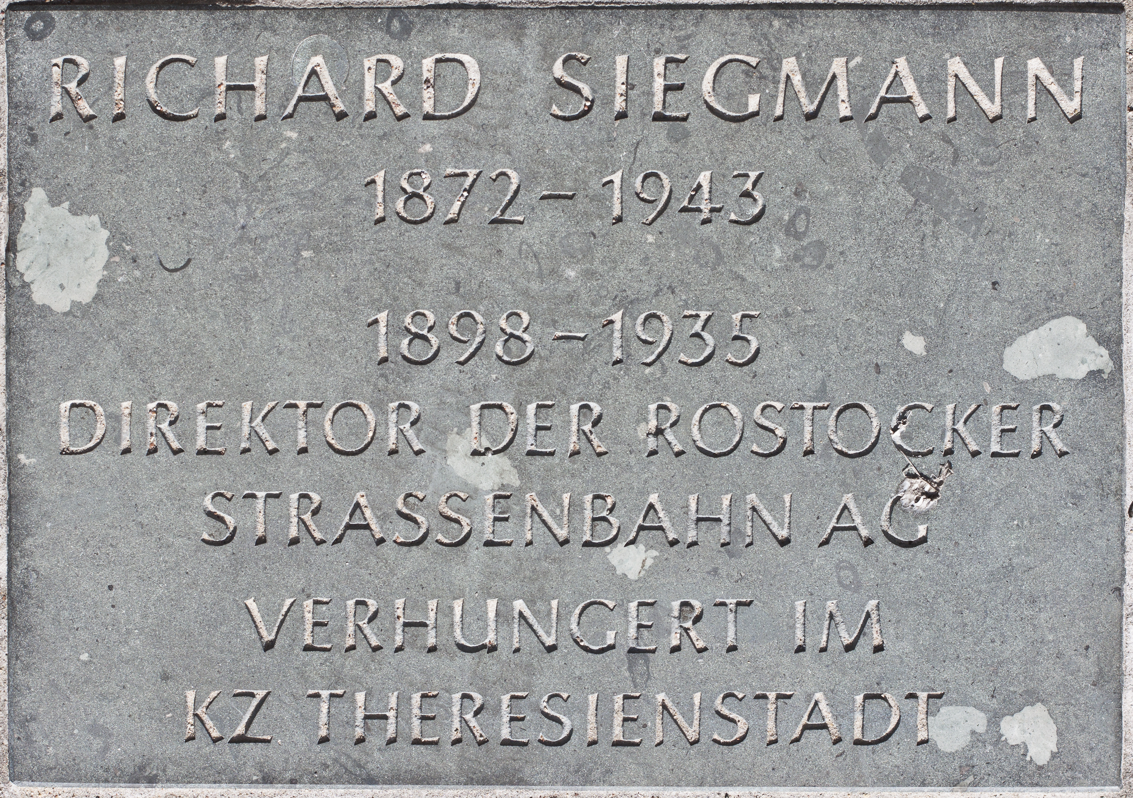 Denkstein für Richard Siegmann, Neuer Markt 1, Rostock